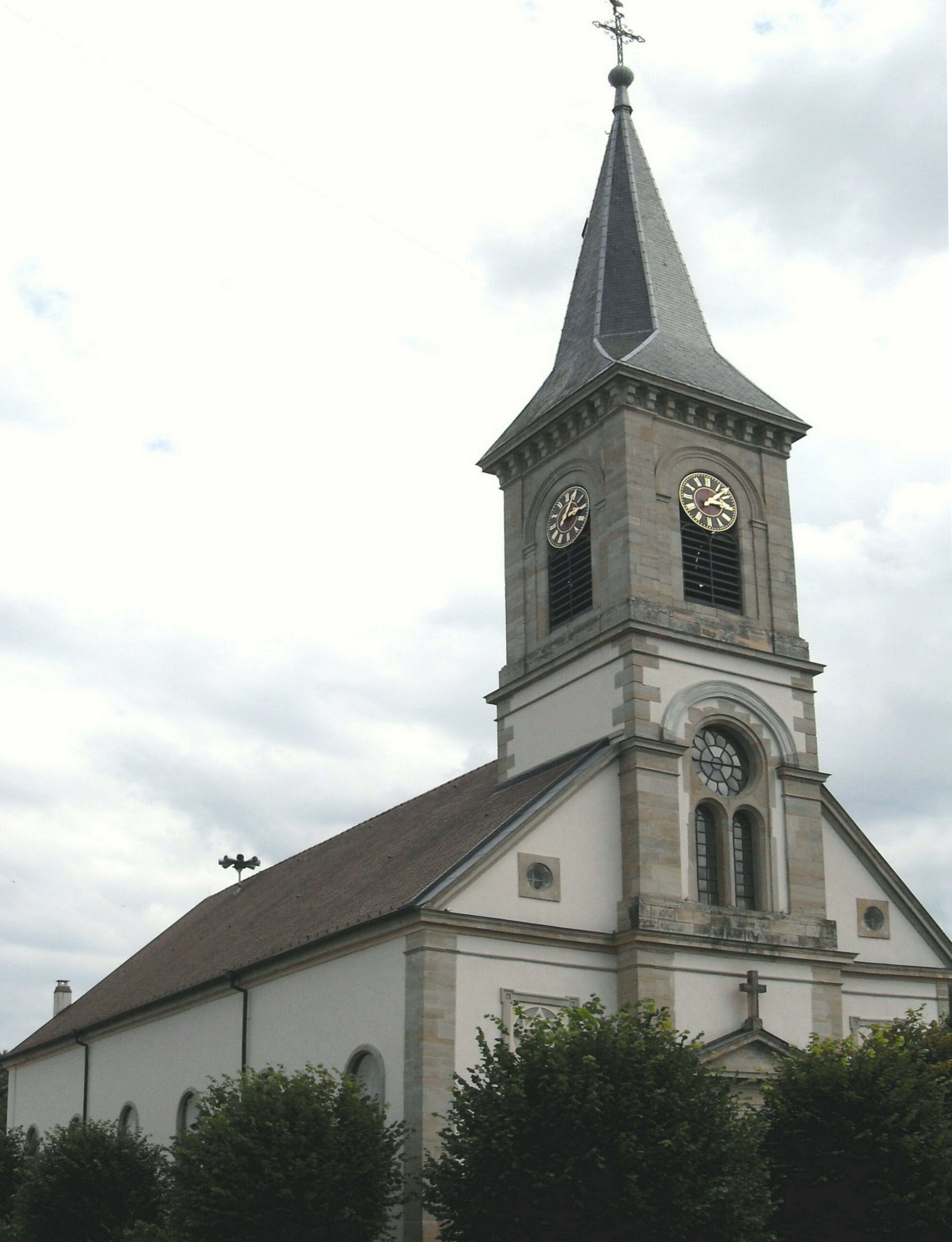 L'église Saint-Pierre, Saint-Paul à Heimersdorf